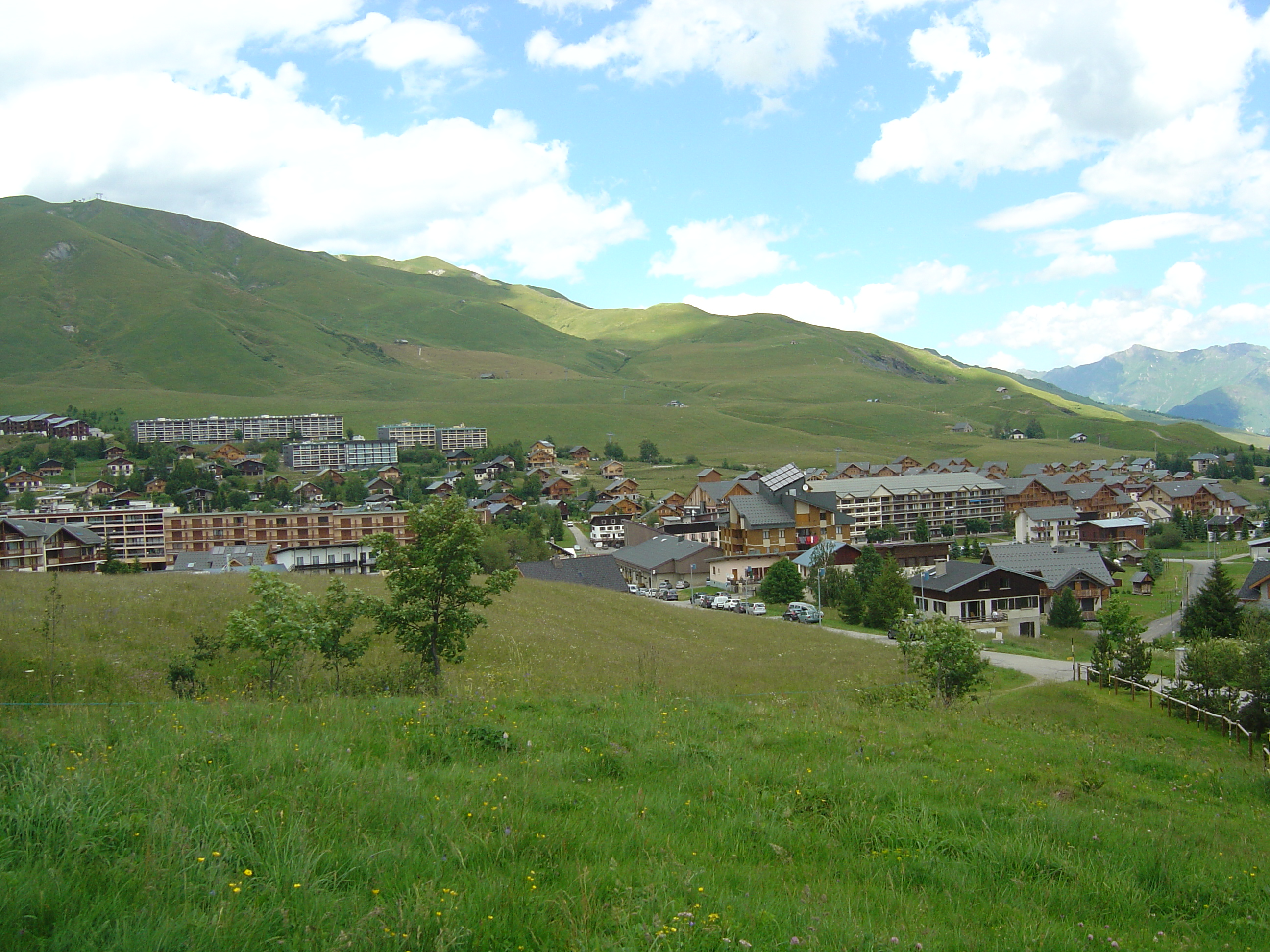 Vue générale de la station de la Toussuire